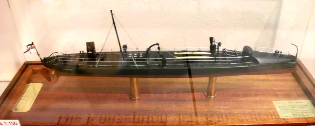 Torpedoboot Tapfer von 1882